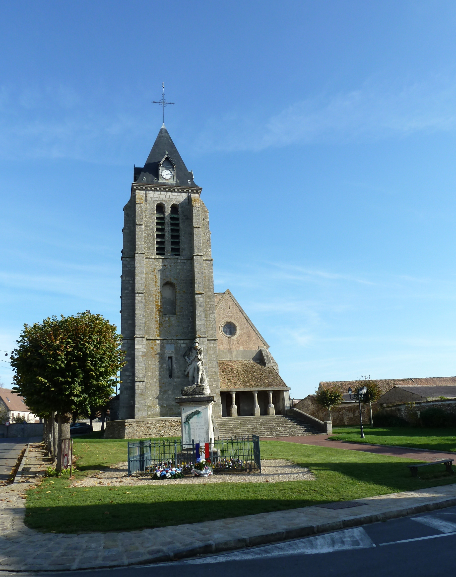 L'église vue de face avec son monument aux morts.